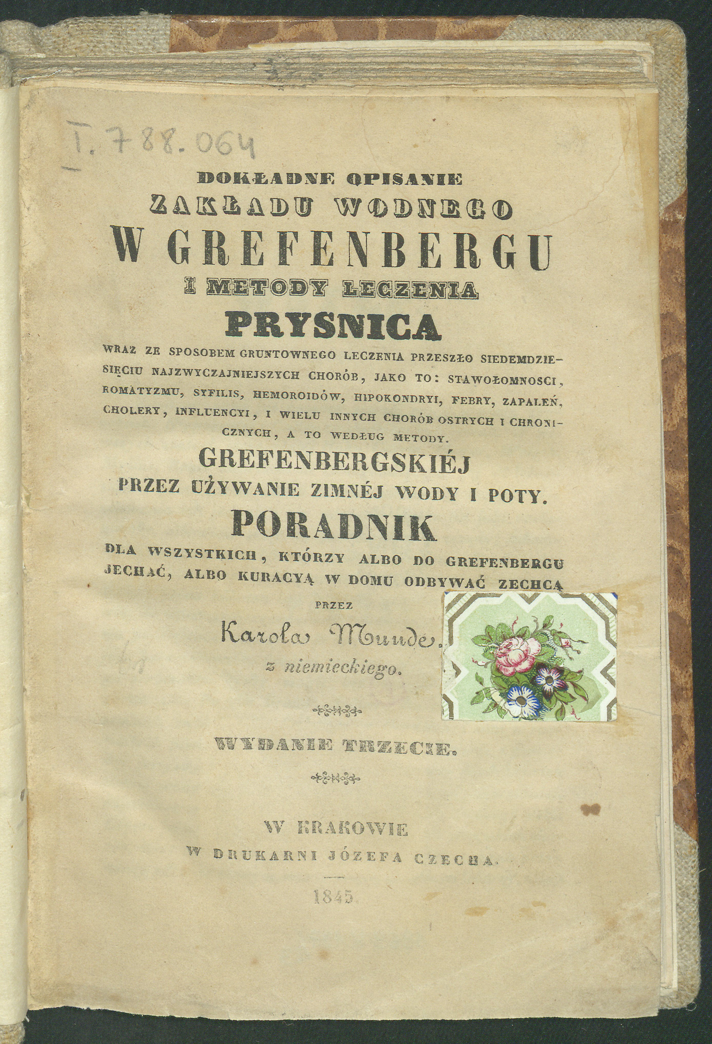 XV, [1], 173 s., [1] k. portr. ; 17 cm